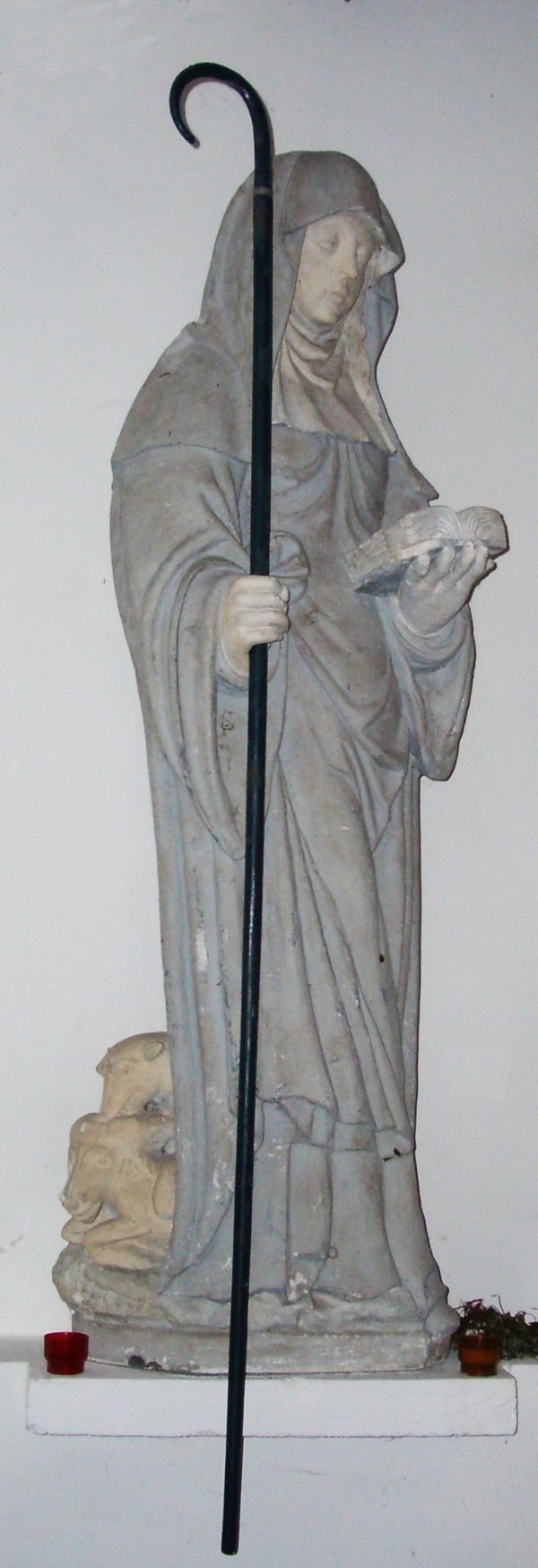 Statue de Sainte Austreberthe (Austrebertha)